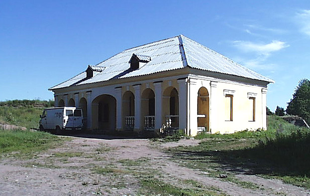 Кардегардия в Выборге. Сгорела летом 2013 года.